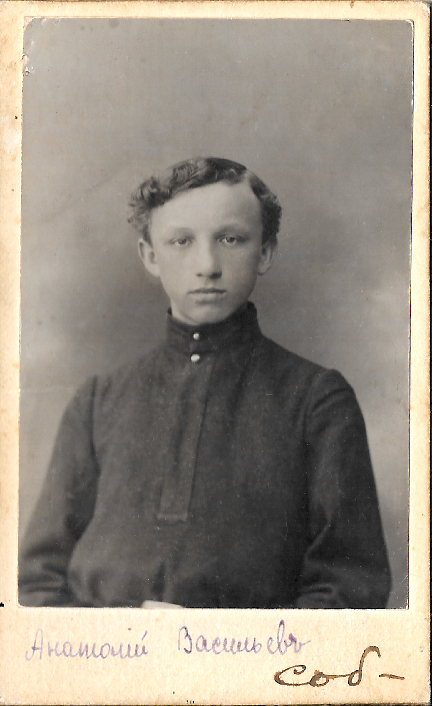 Василев А.Ф. лето 1917 года